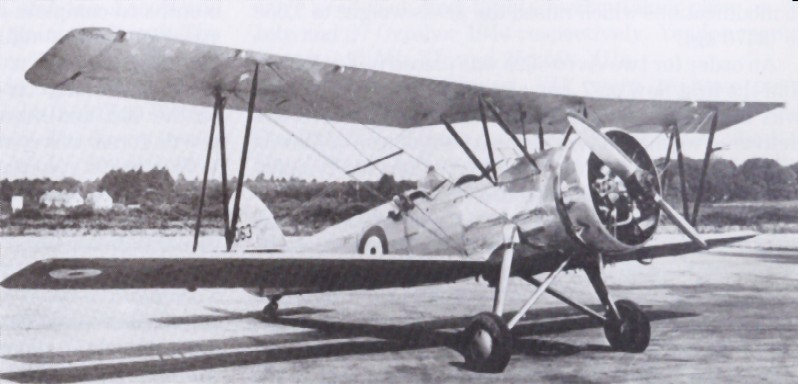 An RAF Avro 626 (Avro Perfect).